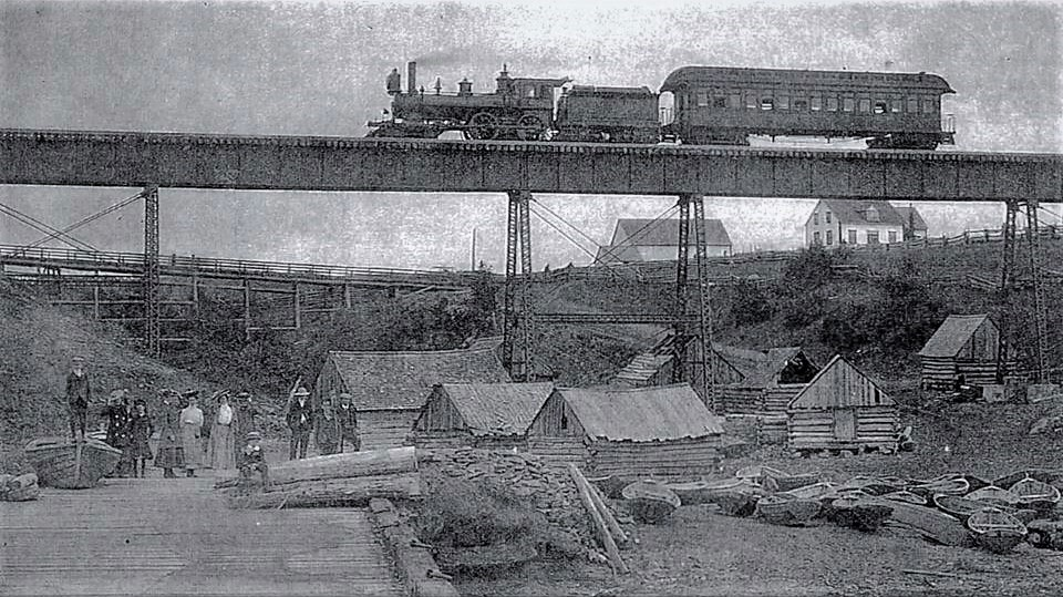 Pont ferroviaire sur le ruisseau Leblanc à Saint-Siméon « Photographie de la Mary sur un pont à Caplan. Cette locomotive est celle qui aurait voyagé par bateau vers New Carlisle. »